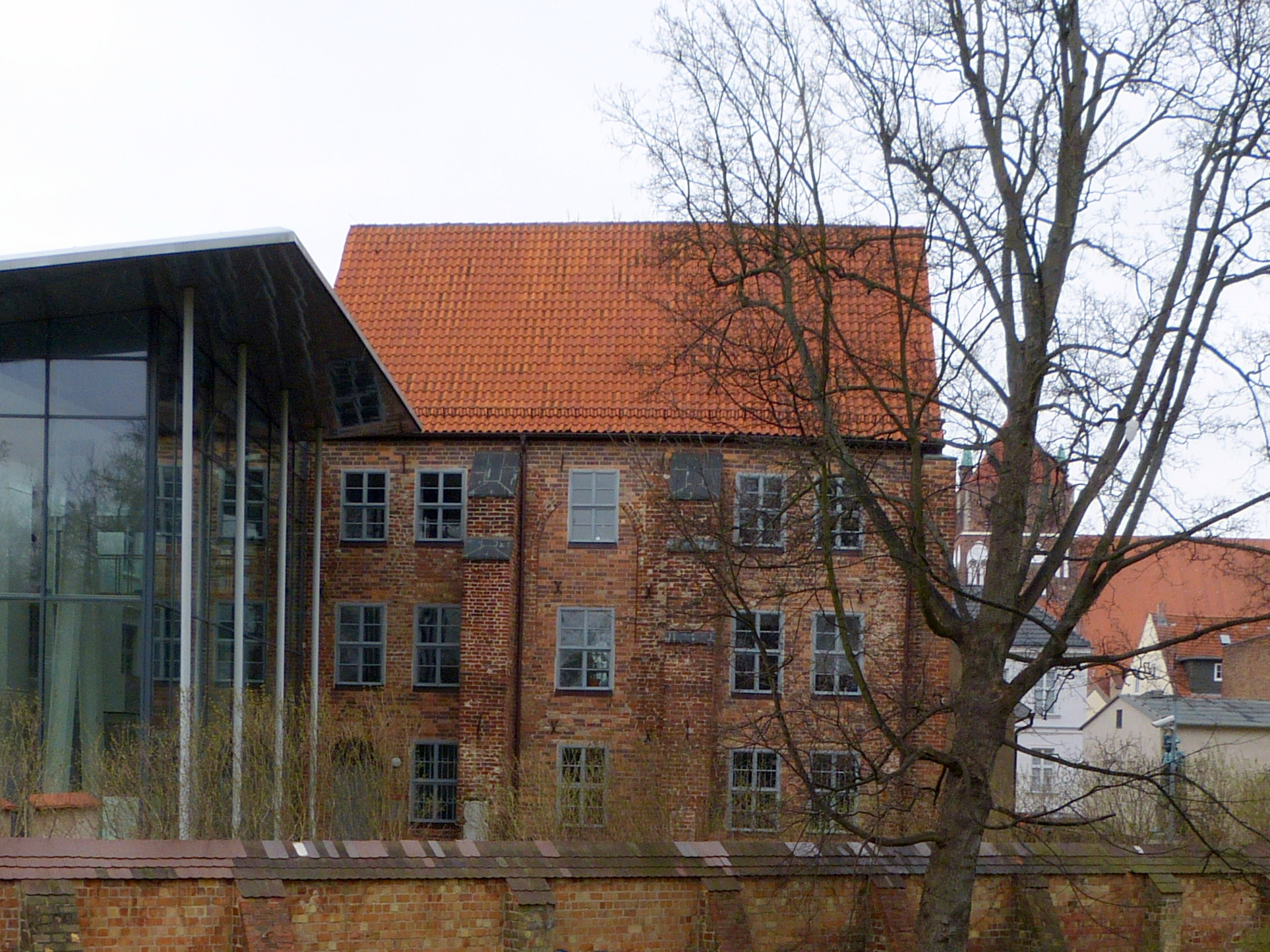 Greifswald, ehemalige Klosterbibliothek der Franziskaner, heute Teil des Pommerschen Landesmuseums